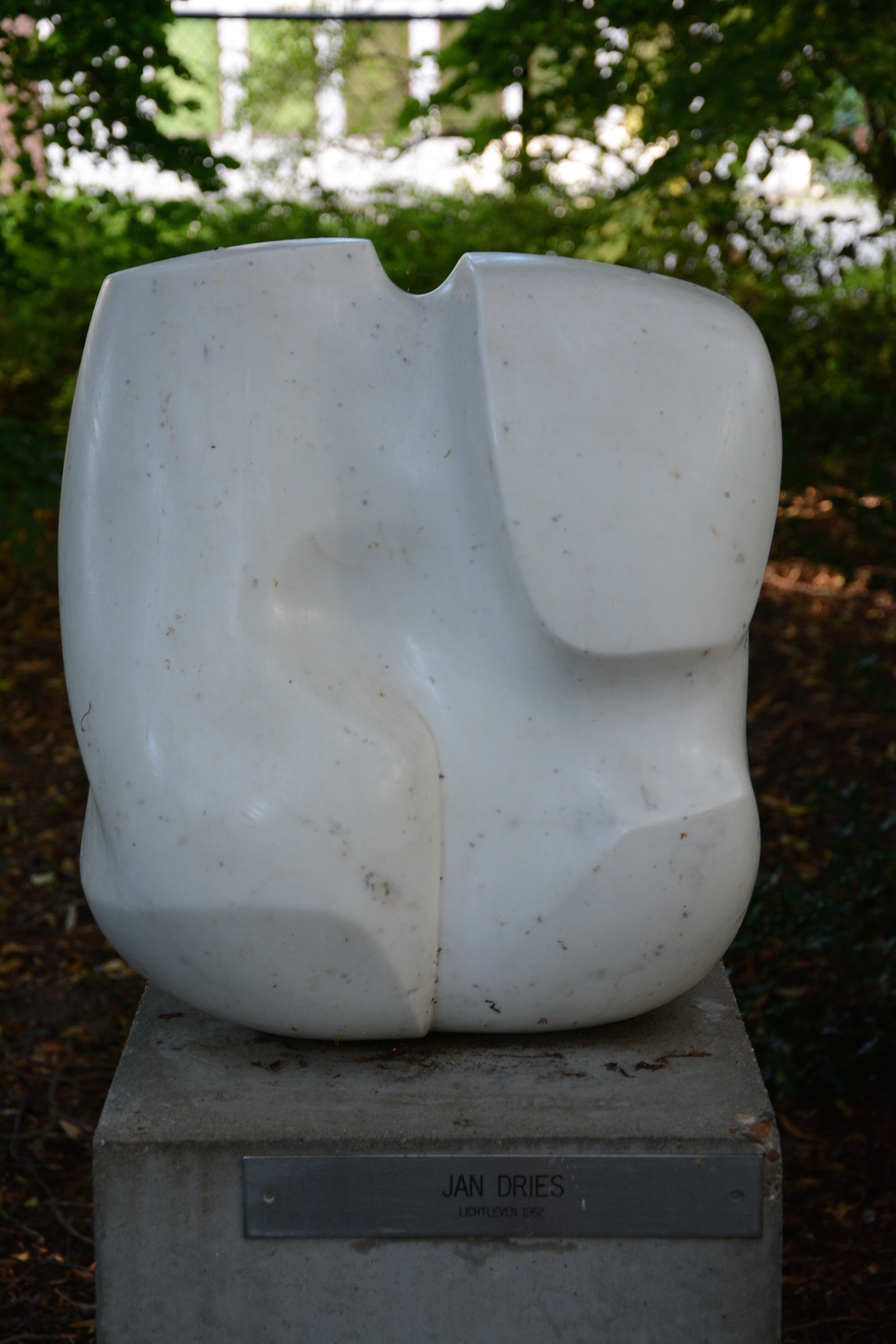 Jan Dries, Lichtleven, 1962